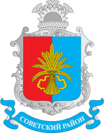 Герб Совєтського району Криму